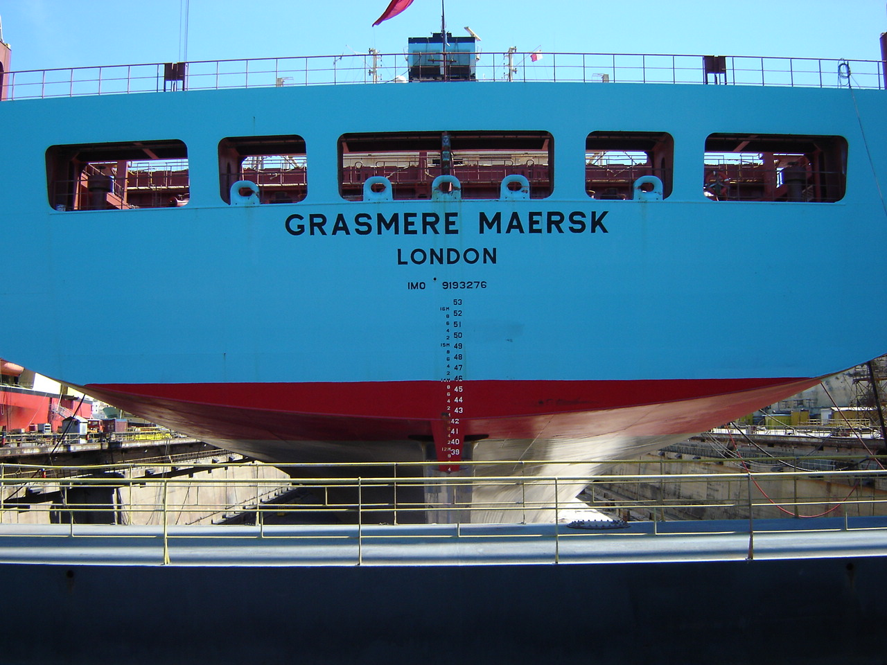 Boote und marine Anlagen, Zubehör und Details. Malta, April 2006. Containerschiff Heckansicht, Tiefgangsmarke (Ahming), IMO-Nr. (Schiffsnummer) Mooringdeck mit Winden und Tauklüsen.